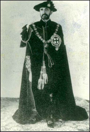 H.I.M. Haile Sellassie I in Knight of the Garter regalia